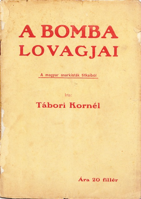 Tábori Kornél A bomba lovagjai című könyvének borítója